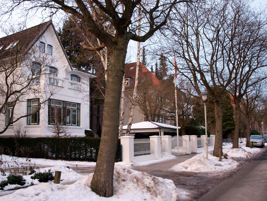 Die Moltkestraße in Höhe Nr. 5 dem Wohnhaus des Germanisten Wolfgang Liepes bis 1933